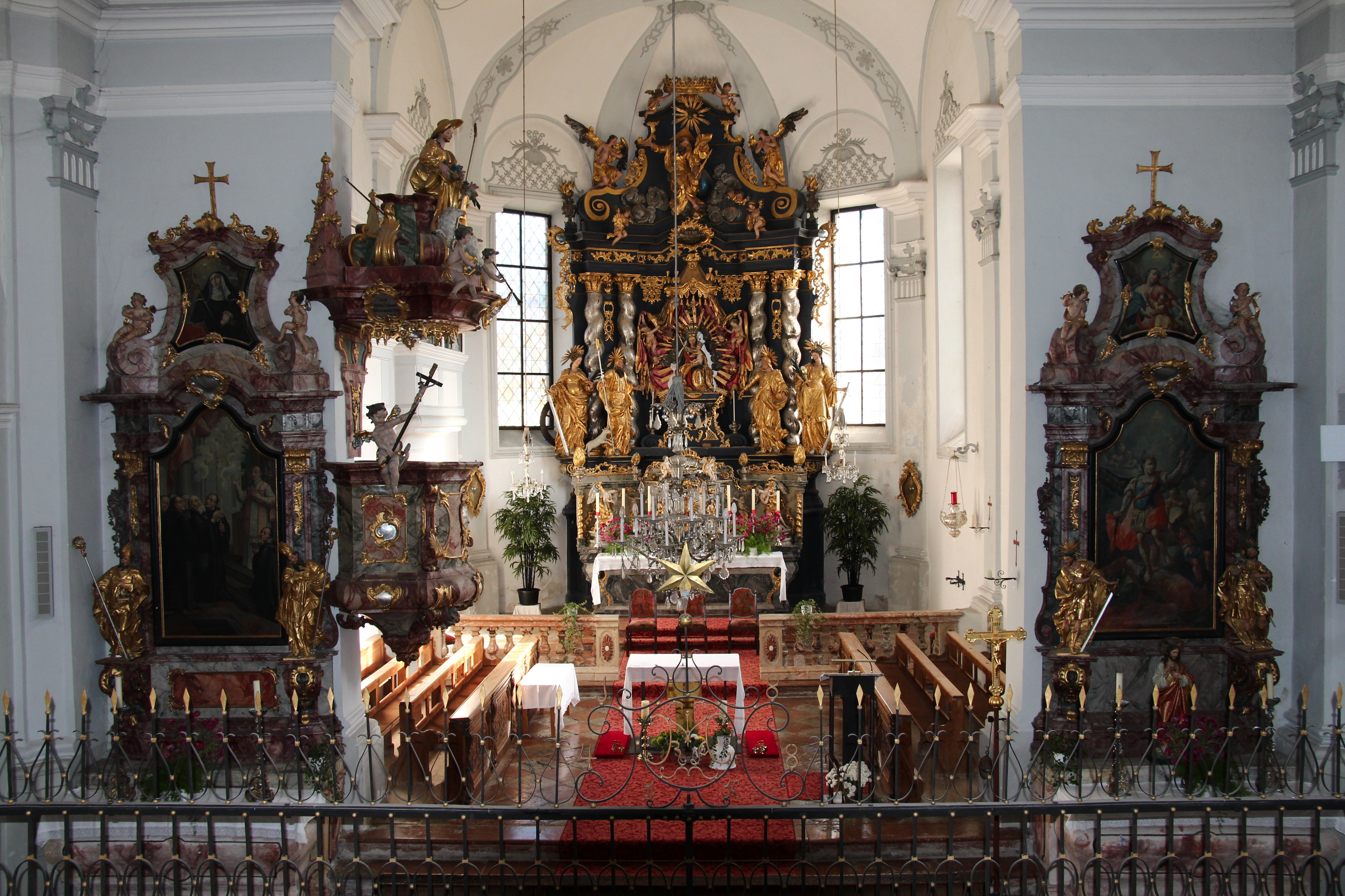 Innenraum der Wallfahrtskirche Maria im Mösl in Arnsdorf, Gemeinde Lamprechtshausen, Land Salzburg